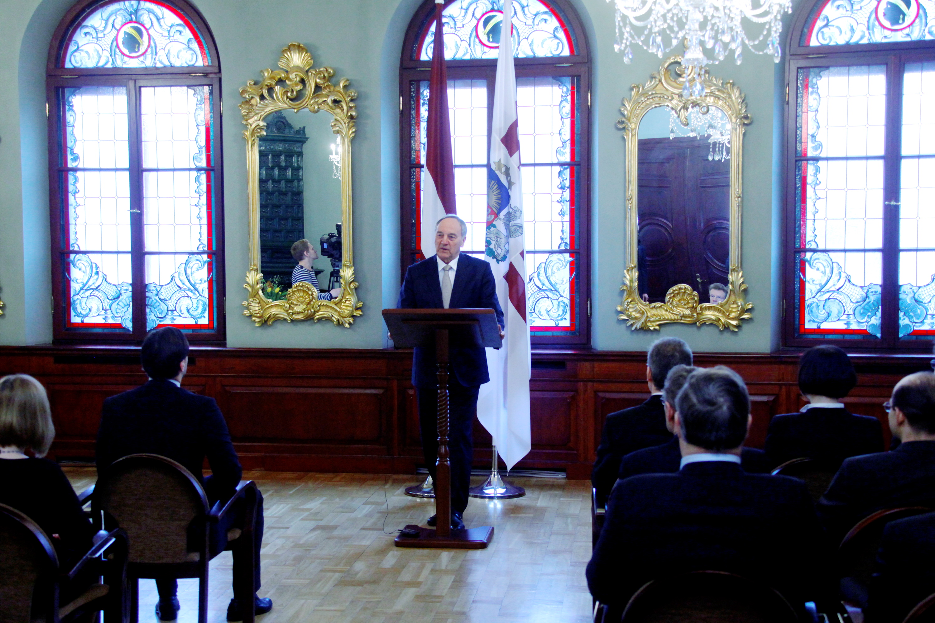 A.Berzins tiekas ar Satversmes komentāru autoriem 2014.gada 24.martā